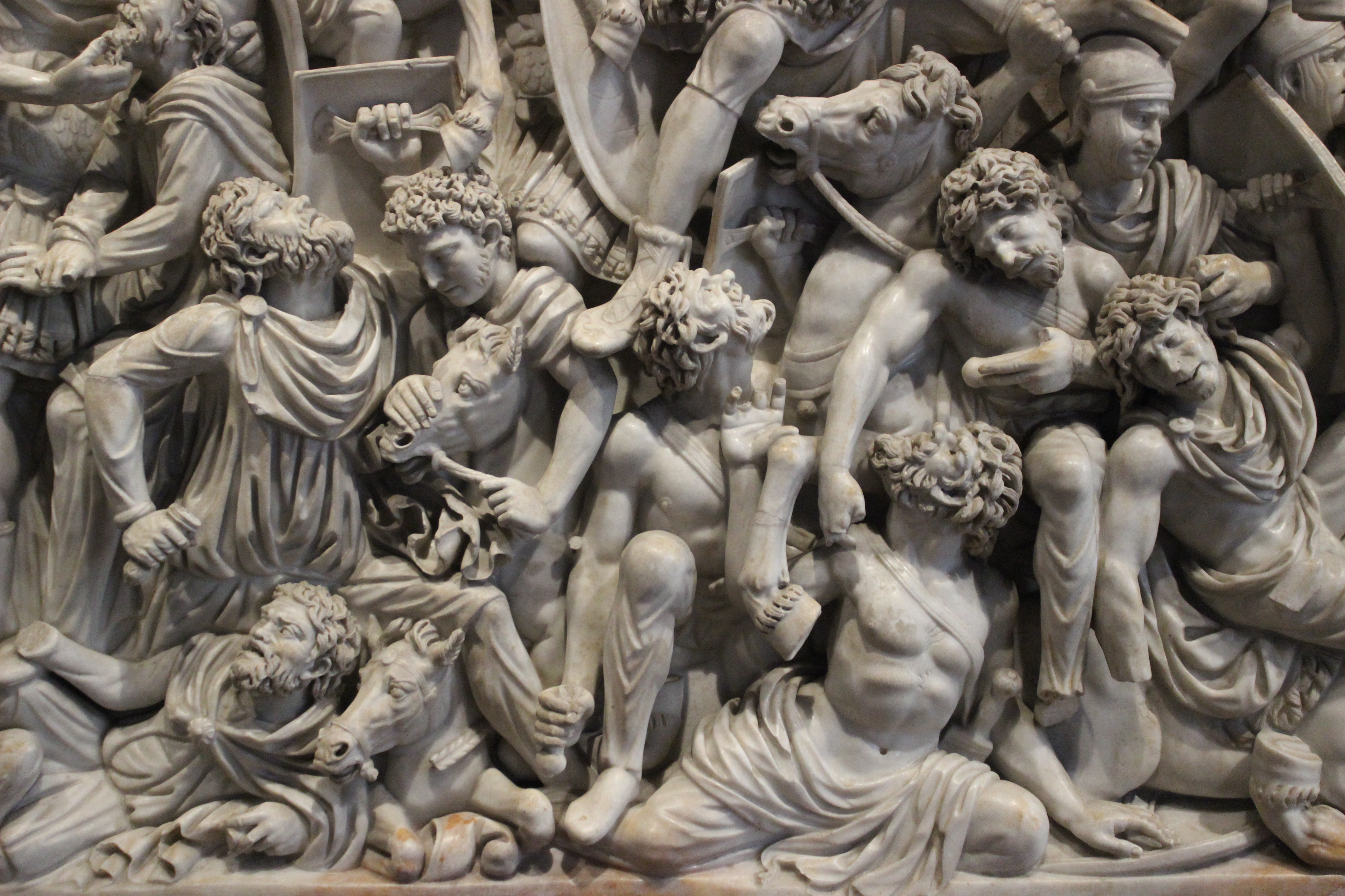 Roma. Palazzo Altemps. Gran sarcófago Ludovisi.